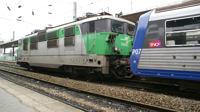 BB 16592 en tête d'une rame 3R en gare d'Amiens